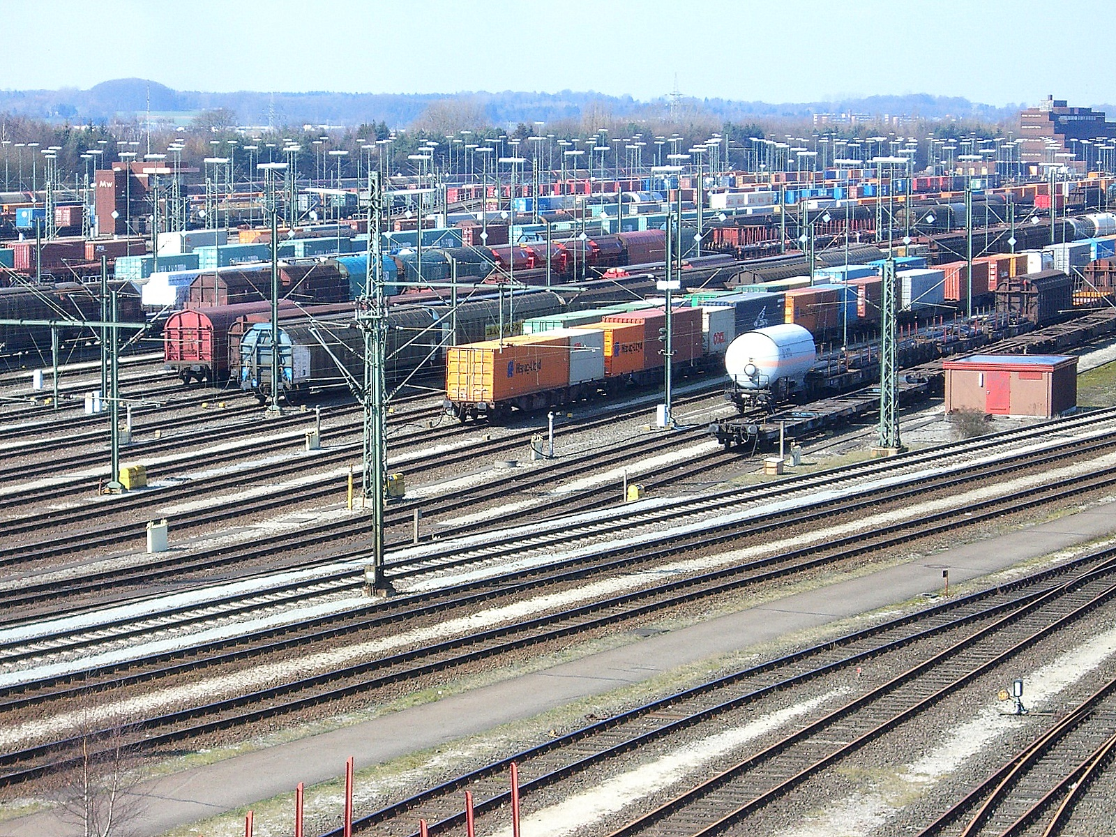 Containerverkehr in Maschen. Maschen Rbf, Richtungsgruppe Nord-Süd